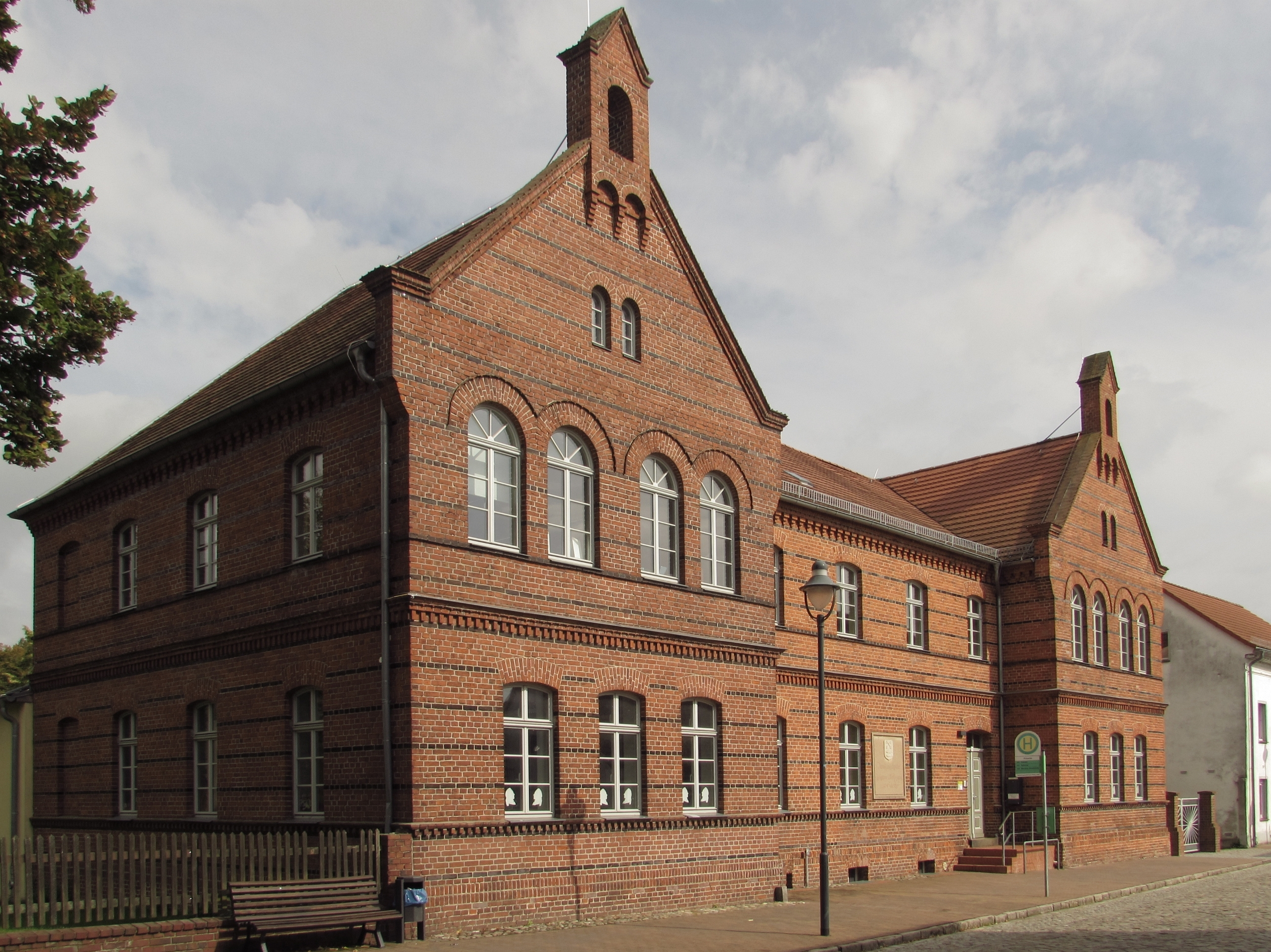 denkmal schulhaus pritzerbe